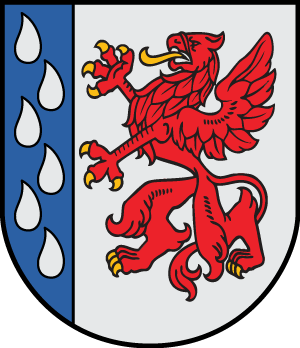 Kategorija:Jaunjelgavas novads Kategorija:Latvijas novadu ģerboņi